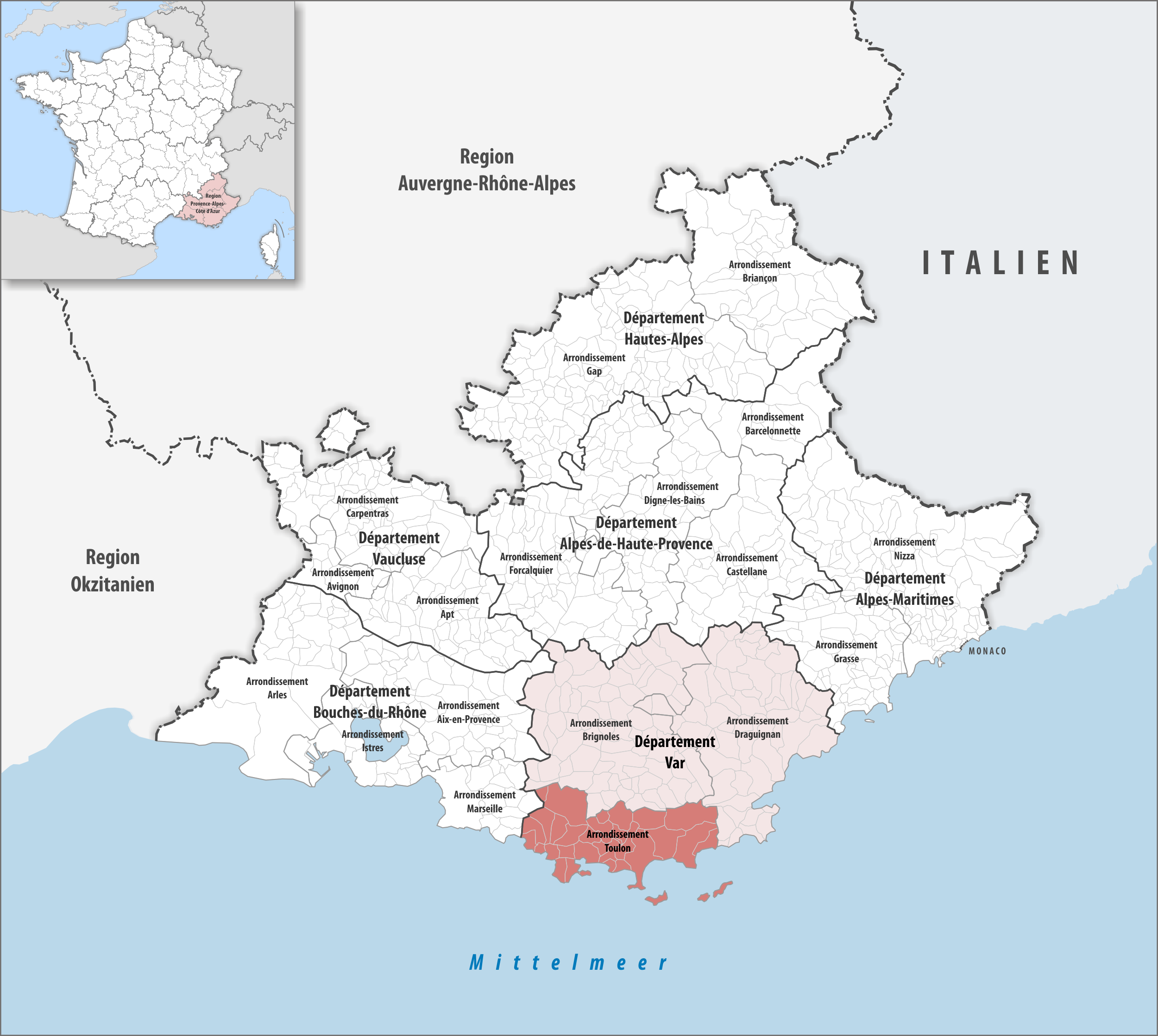 Lage des Arrondissements Toulon